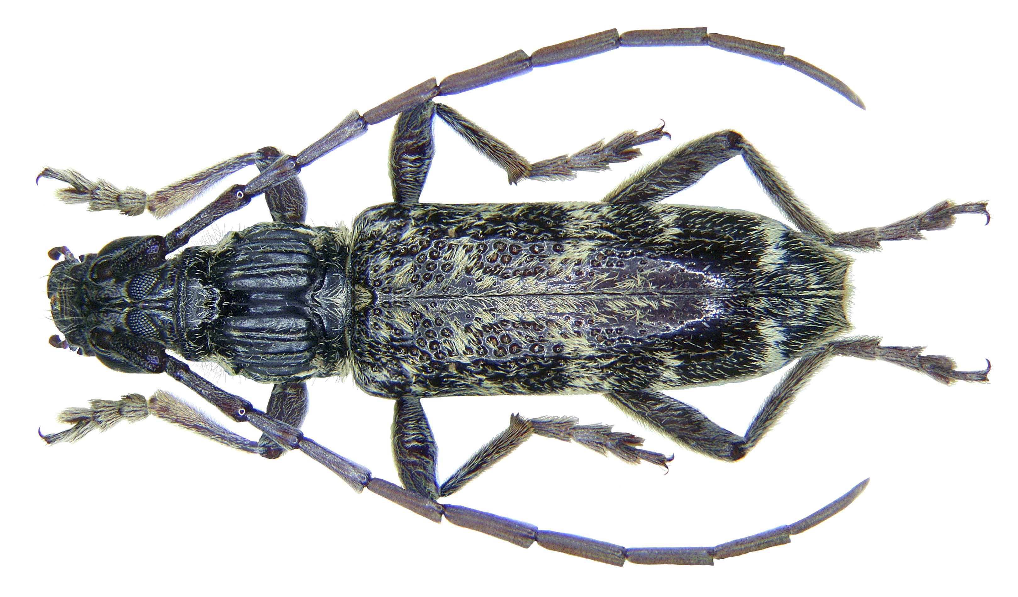 Familie: Cerambycidae Grösse: 17 mm Fundort: Malaysia, Nord-Borneo, Sabah leg. F. bin Eying, 2005: det. Holzschuh, 2007 Foto: U.Schmidt, 2007